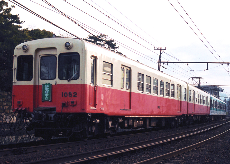 高松琴平電鉄 1052+1051+1100形×2